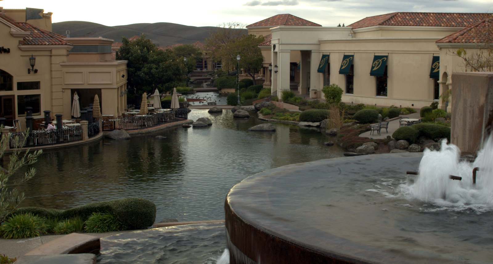 Blackhawk Plaza